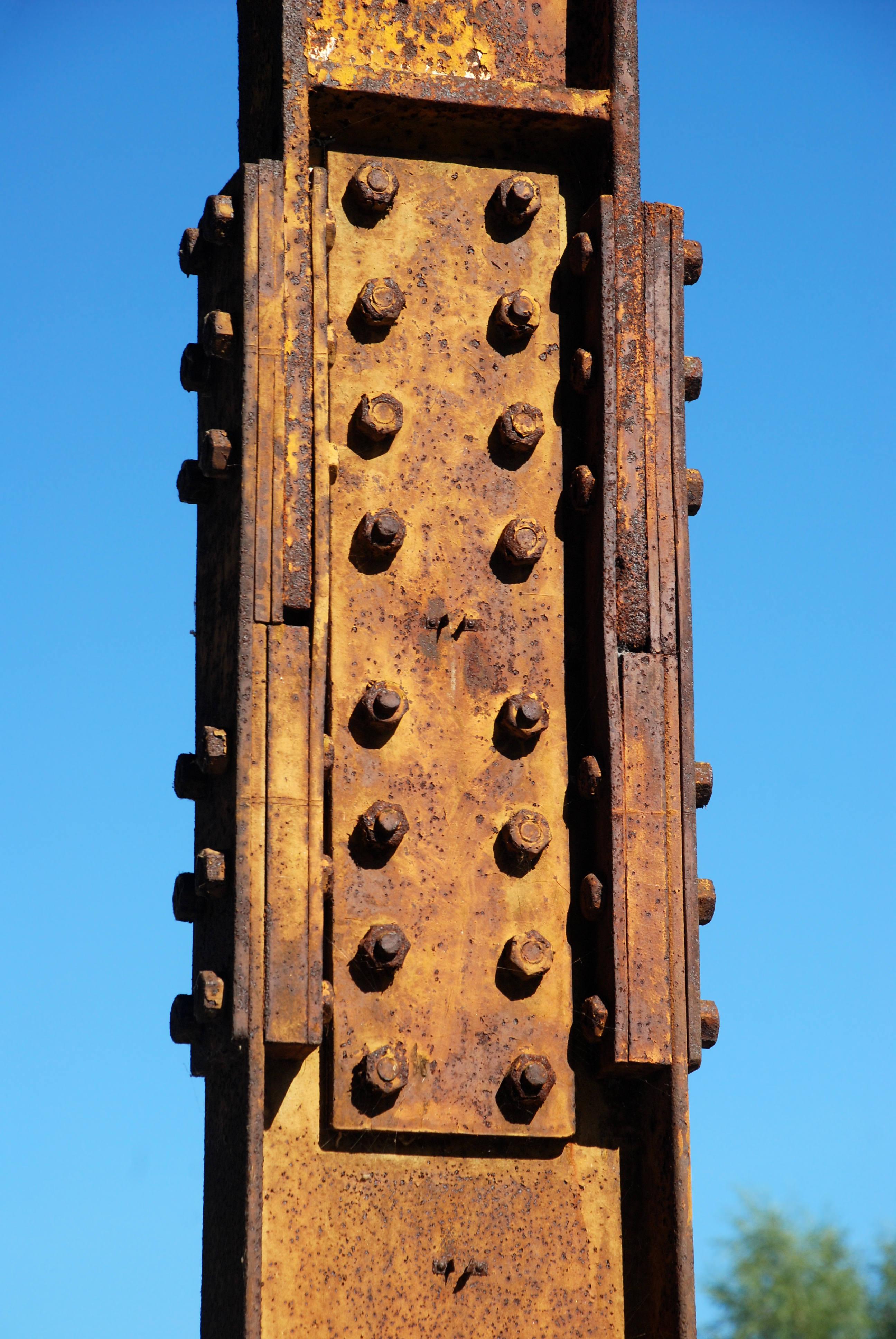 Belgique - Brabant wallon - Hall n° 11 de l'usine Henricot n°1